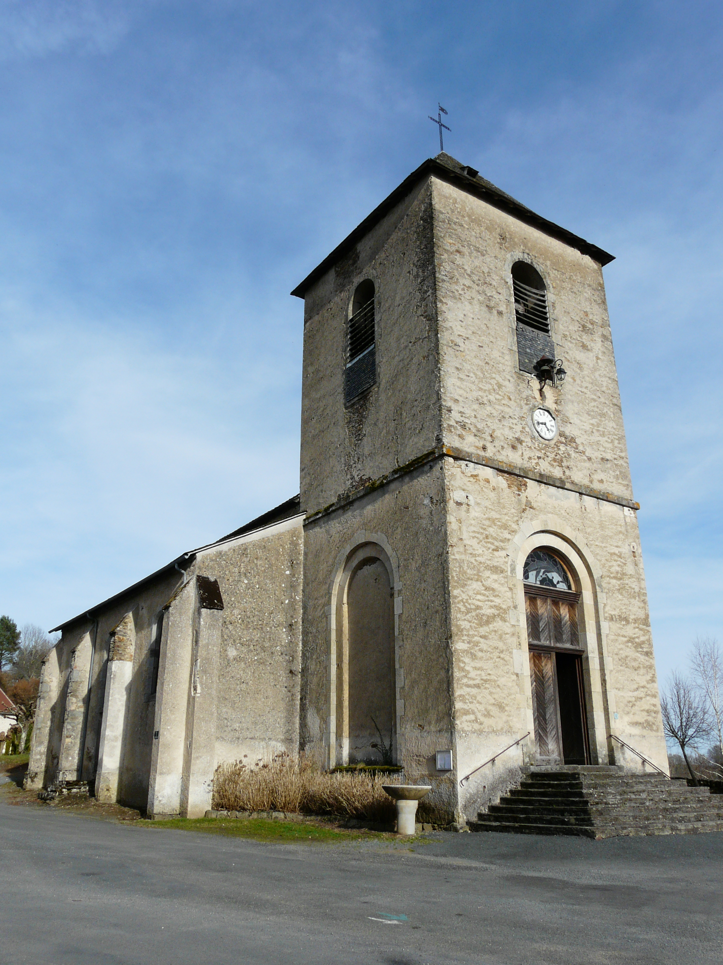 Église Saint-Léger, Ségur-le-Château, Corrèze, France